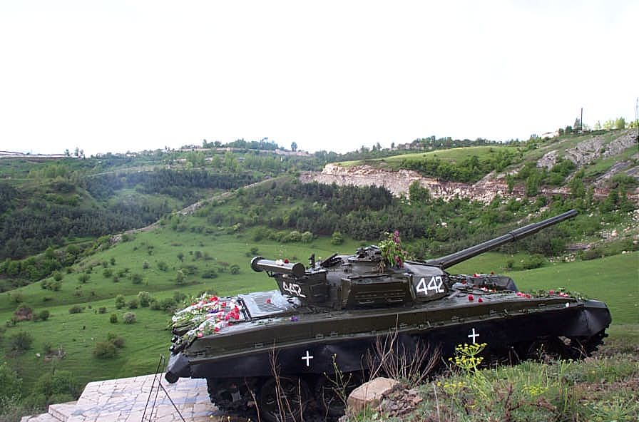 Shushi Tank Memorial